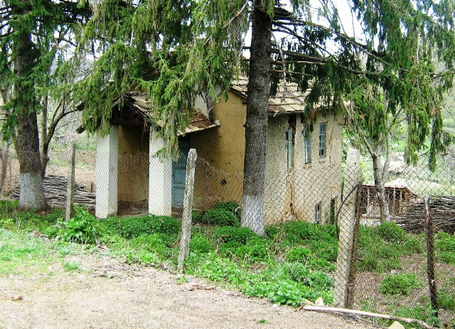 Евангелистката (протестантска) църква на село Долна Кабда, останала от времето на вече изселилото се от селото християнското население. Фото: Вл. Стойков - април 2008 год.